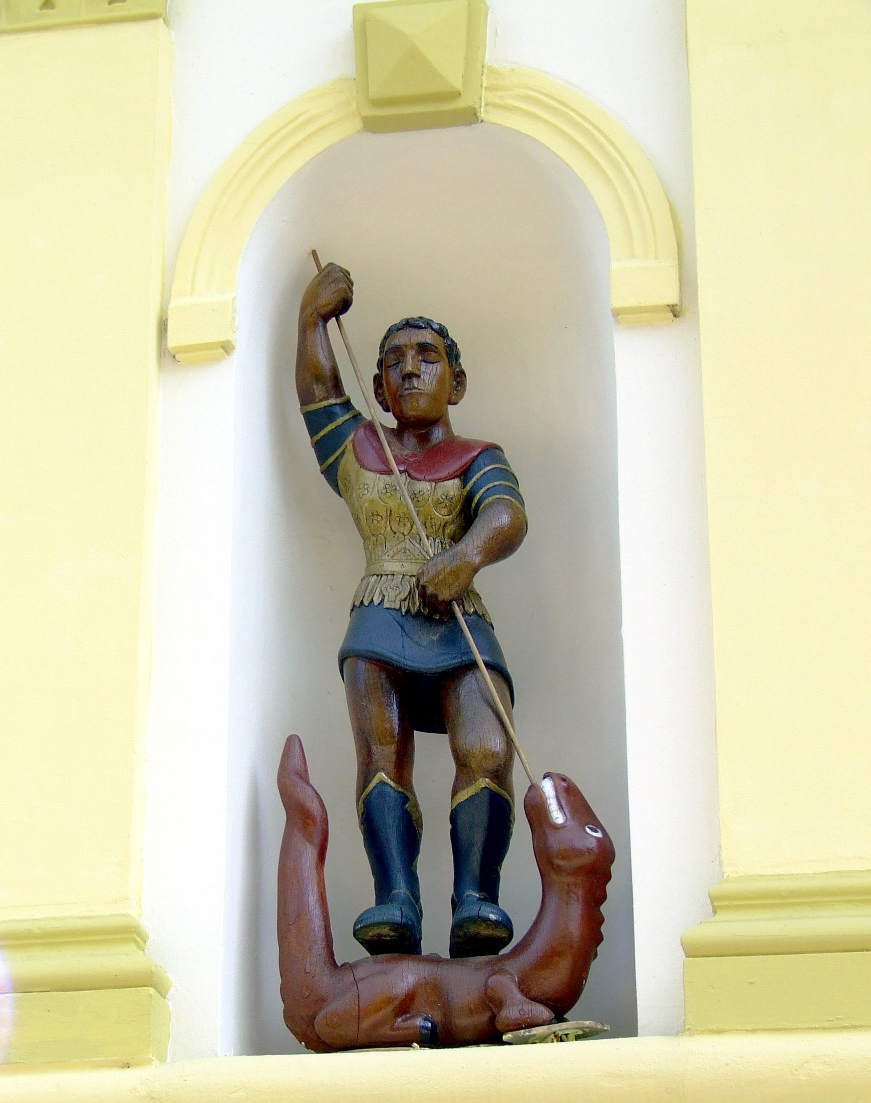 Lóránt ZsuzsaSzent György és a sárkány című szobra Pécsen a volt délszláv művelődési központ falán (fa, 1982)